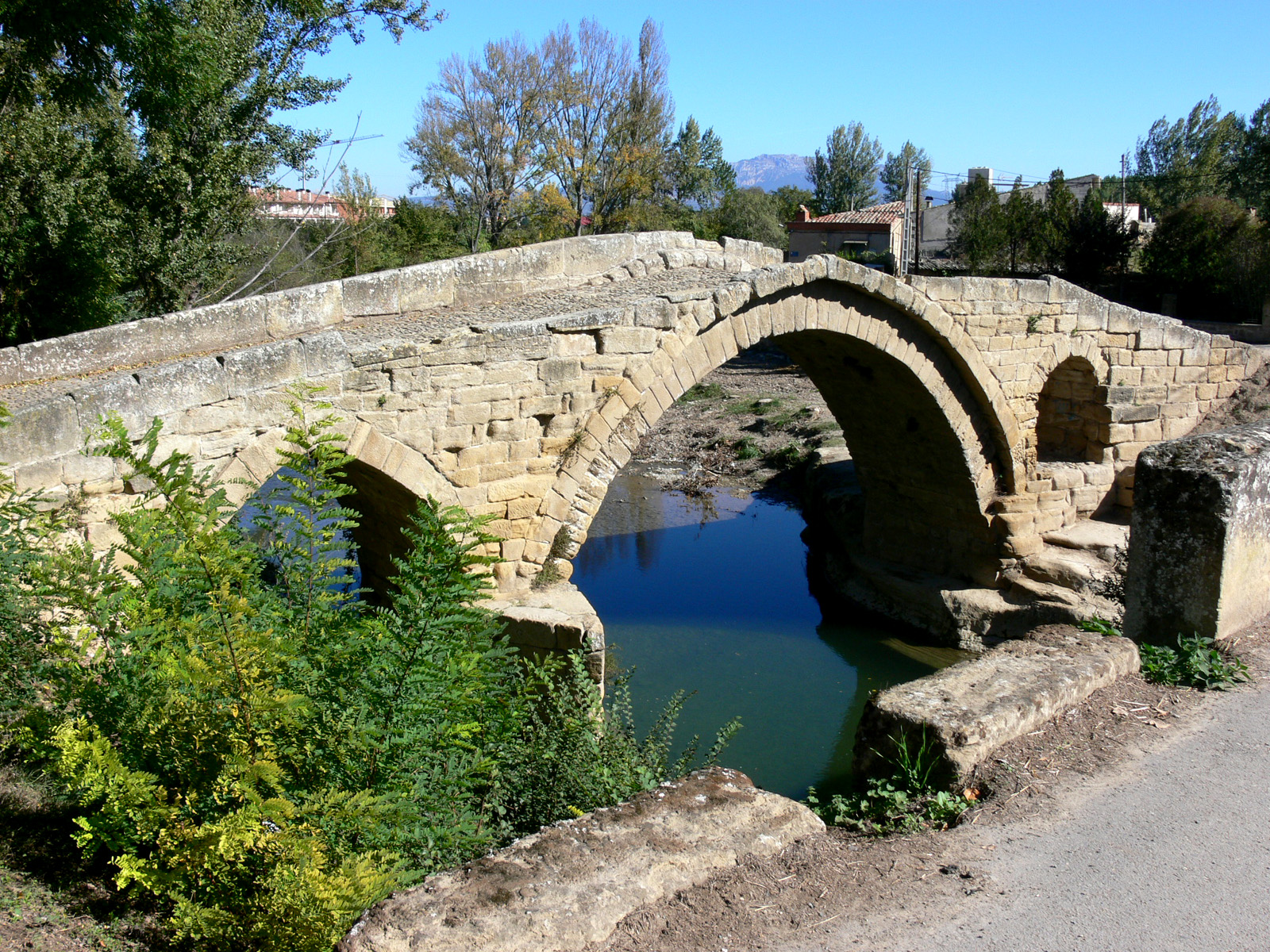 Puente romano de Cihuri, La Rioja - España.